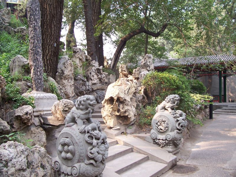 Soong_ching_ling mansion